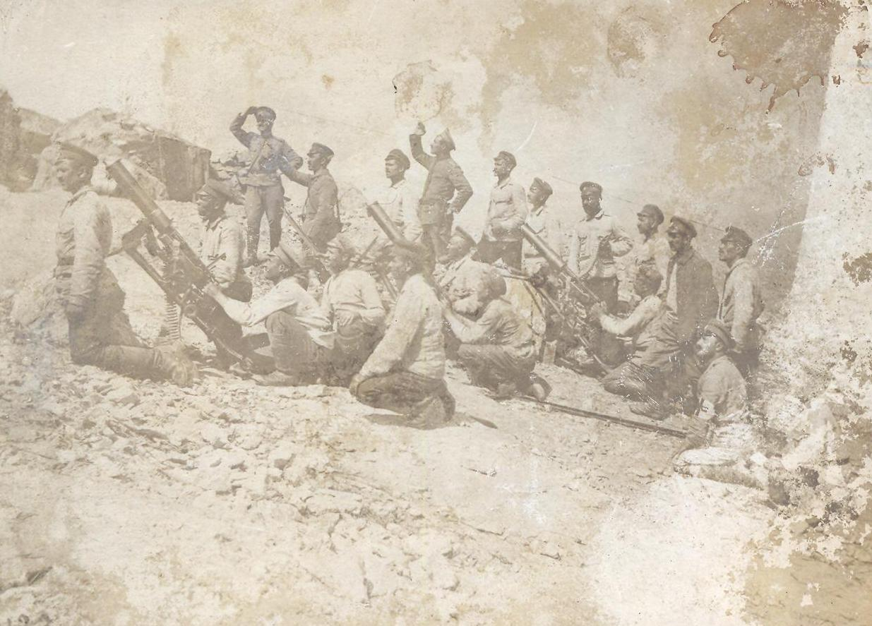 Снимка на български картечен взвод при завоя на Черна, Македония през Първата световна война в очакване на приближаването на неприятелски самолети.